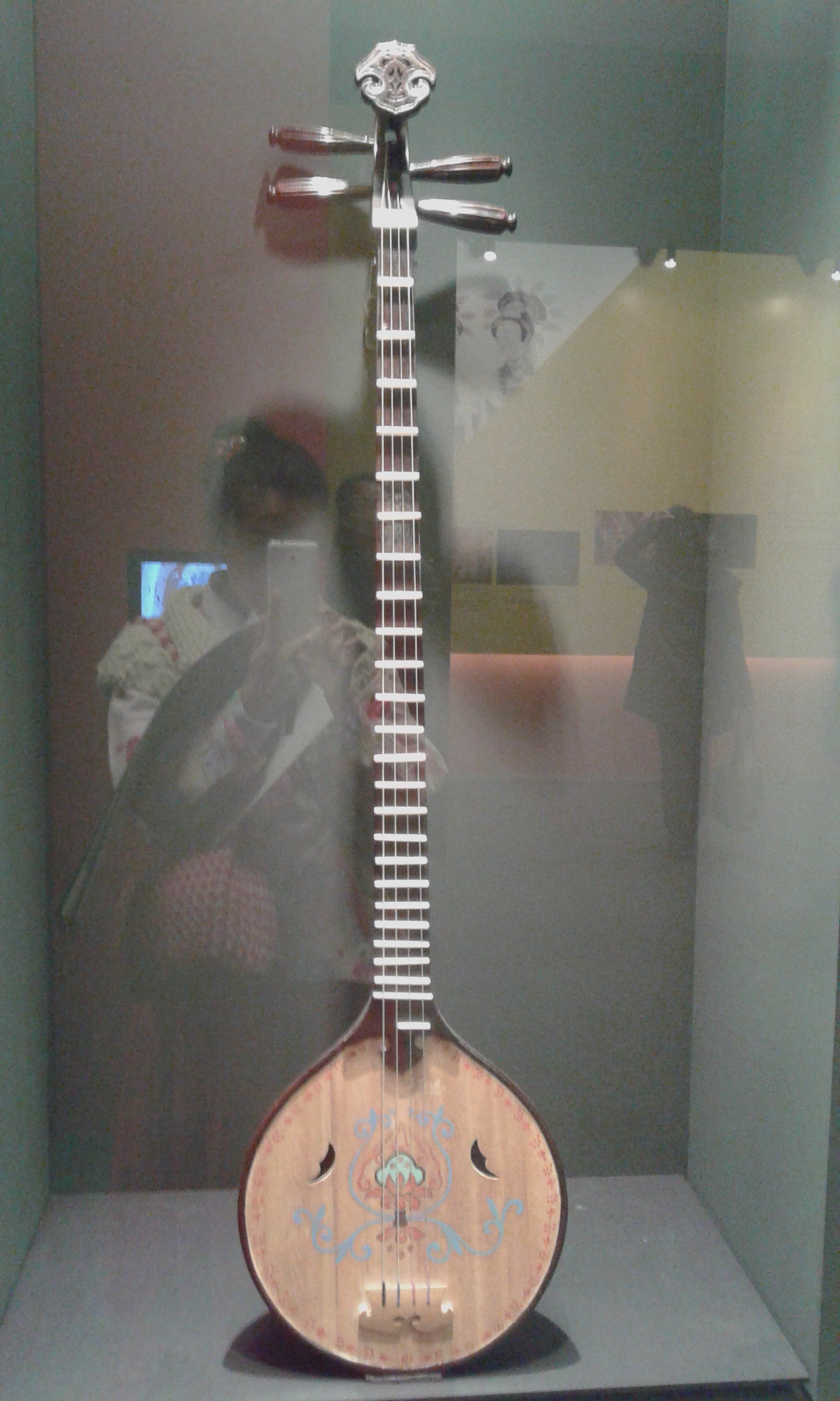 中文（香港）: 由琵琶演變而來的樂器